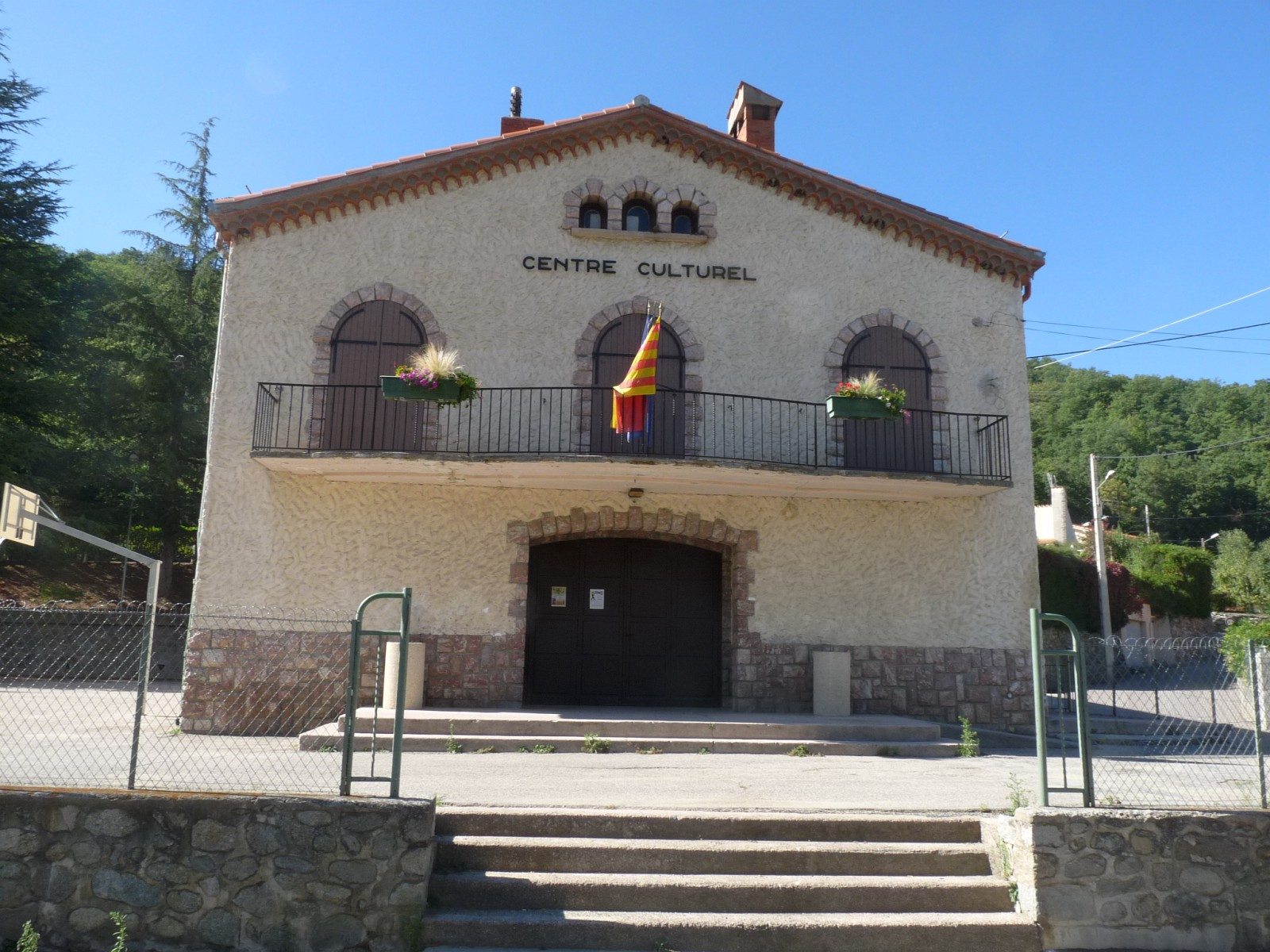 Salle des fêtes de Sahorre, Pyrénées-Orientales, France